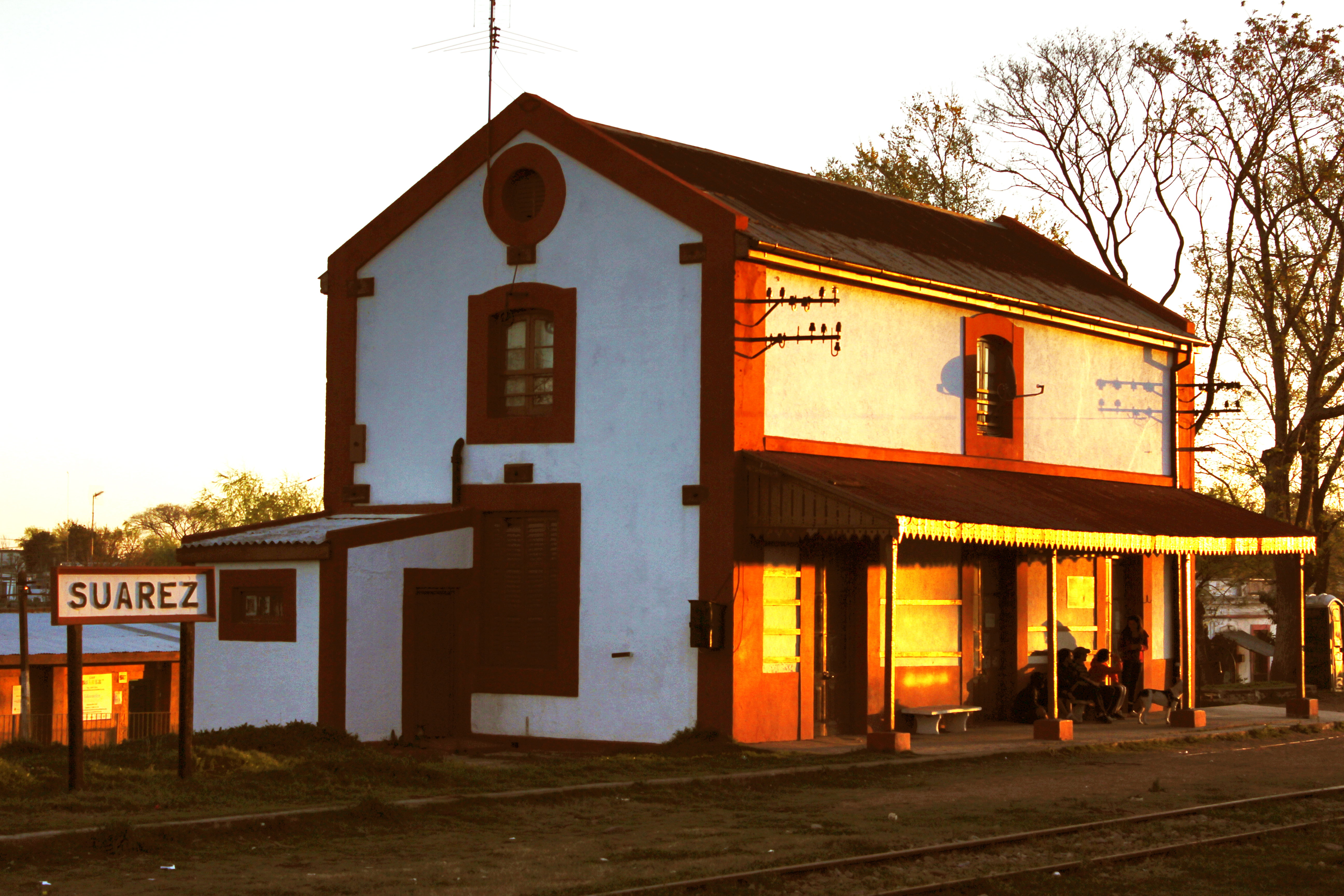 Estación de Trenes Joaquín Suárez y Parque Francisco Piria. Ubicada en el departamento de Canelones